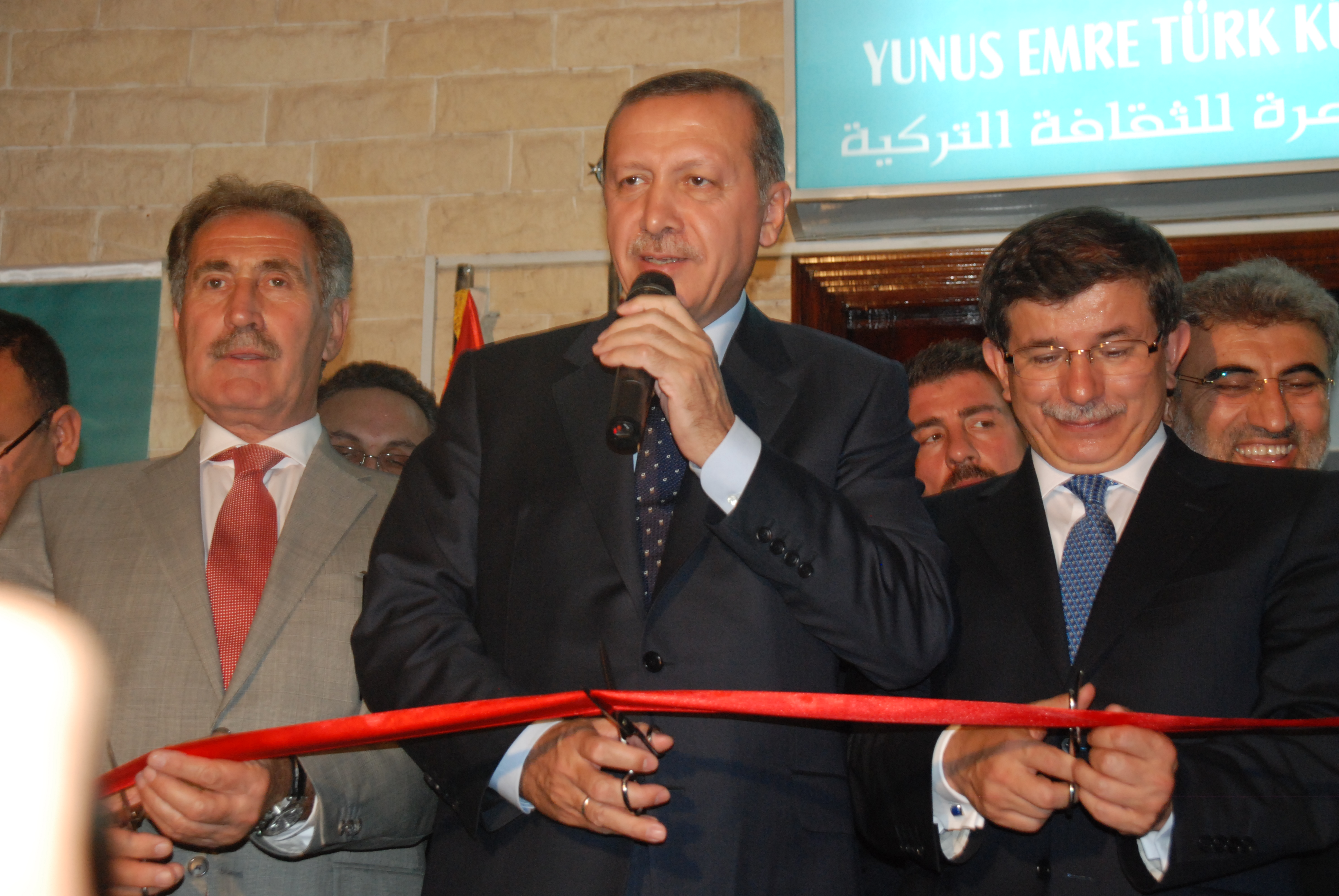 Recep Tayyip Erdoğan Açılış Töreni